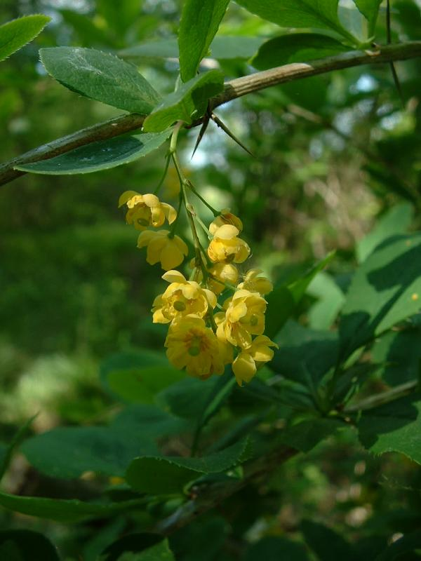 Épine vinette, photo J.F. Gaffard, Auberive, mai 2004.